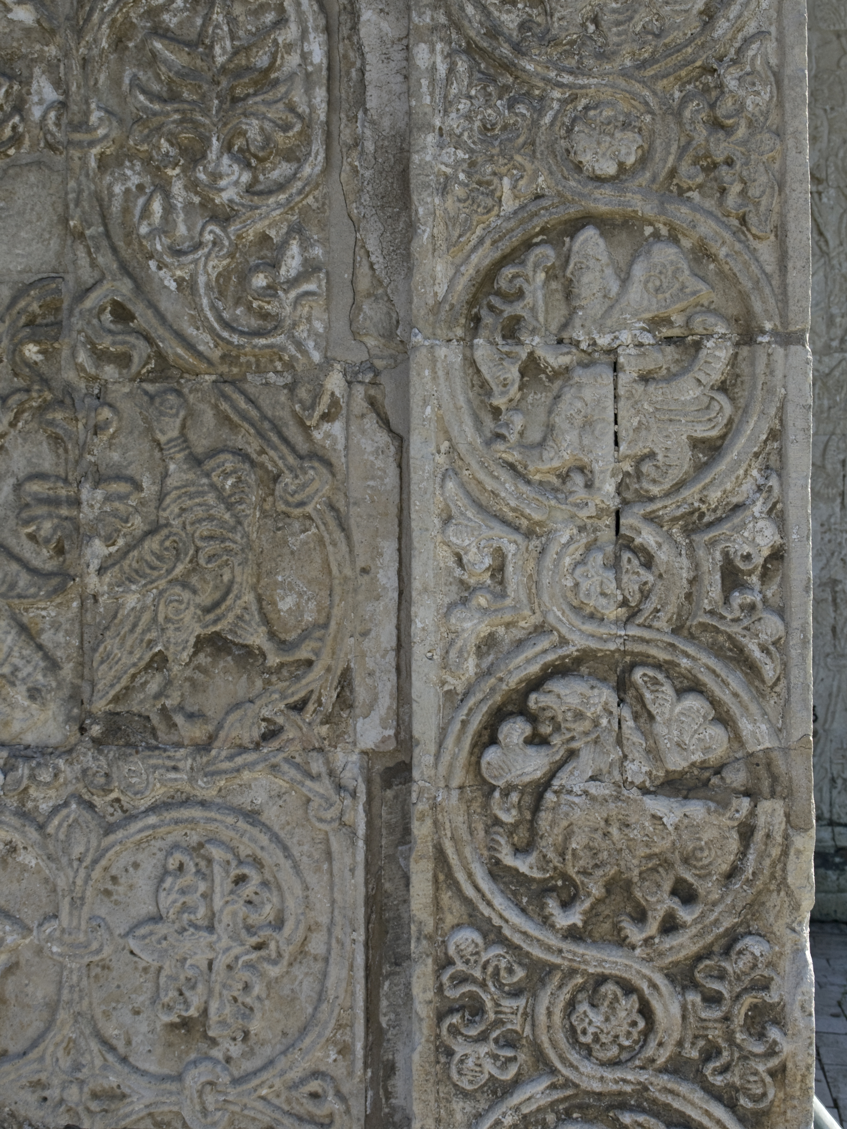 Details of carvings of the western porch, Saint George Cathedral, Yuryev Polsky